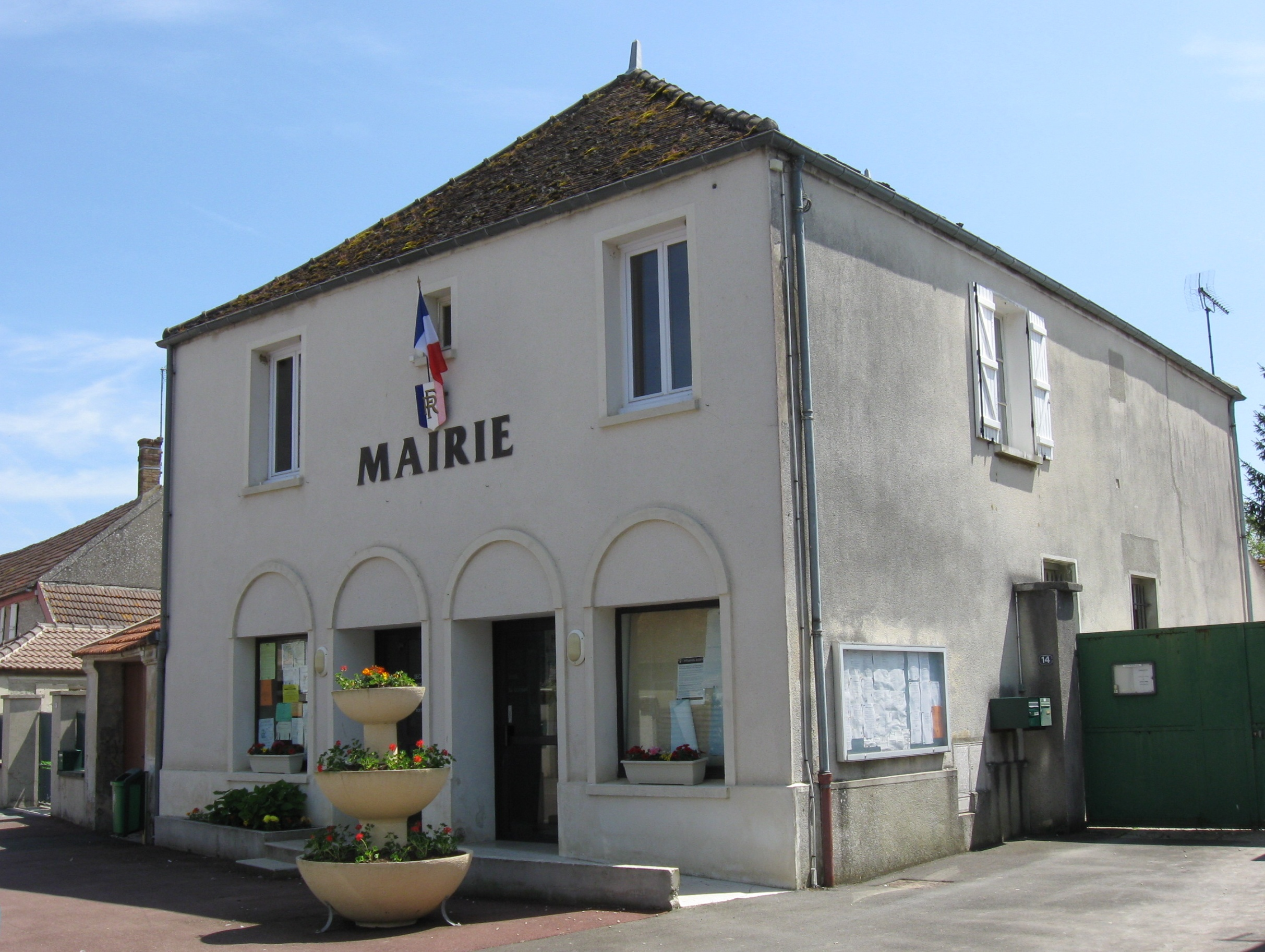 Mairie de Maison-Rouge. (Seine-et-Marne, région Île-de-France).